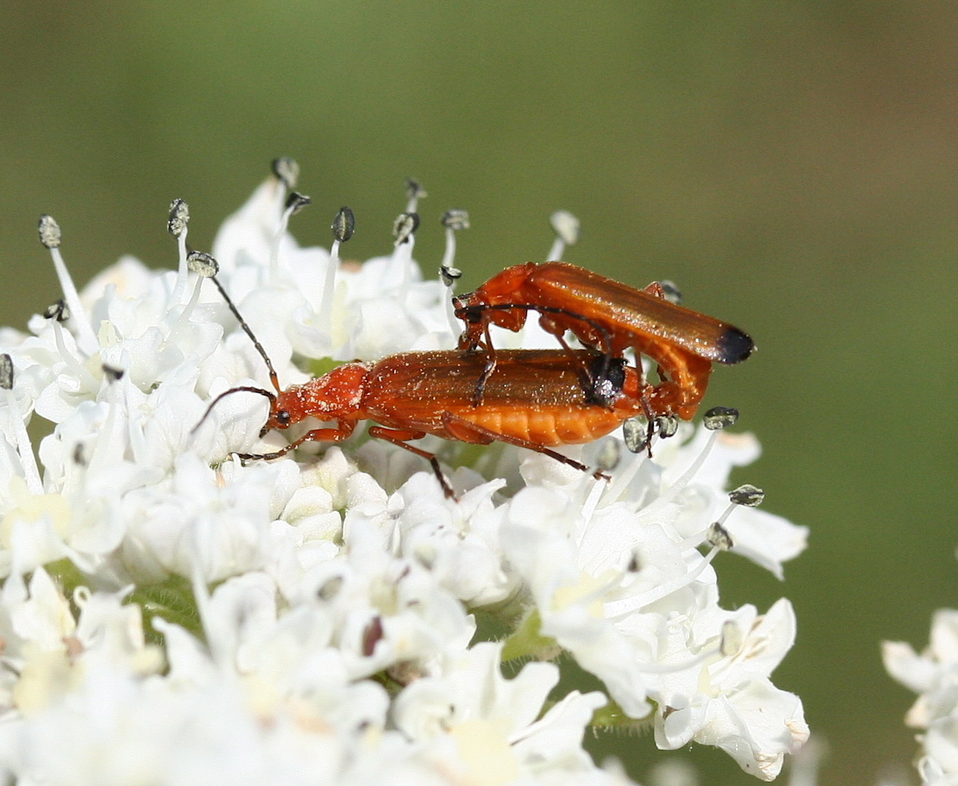 Coleoptera - Cantharidae - Rhagonycha fulva